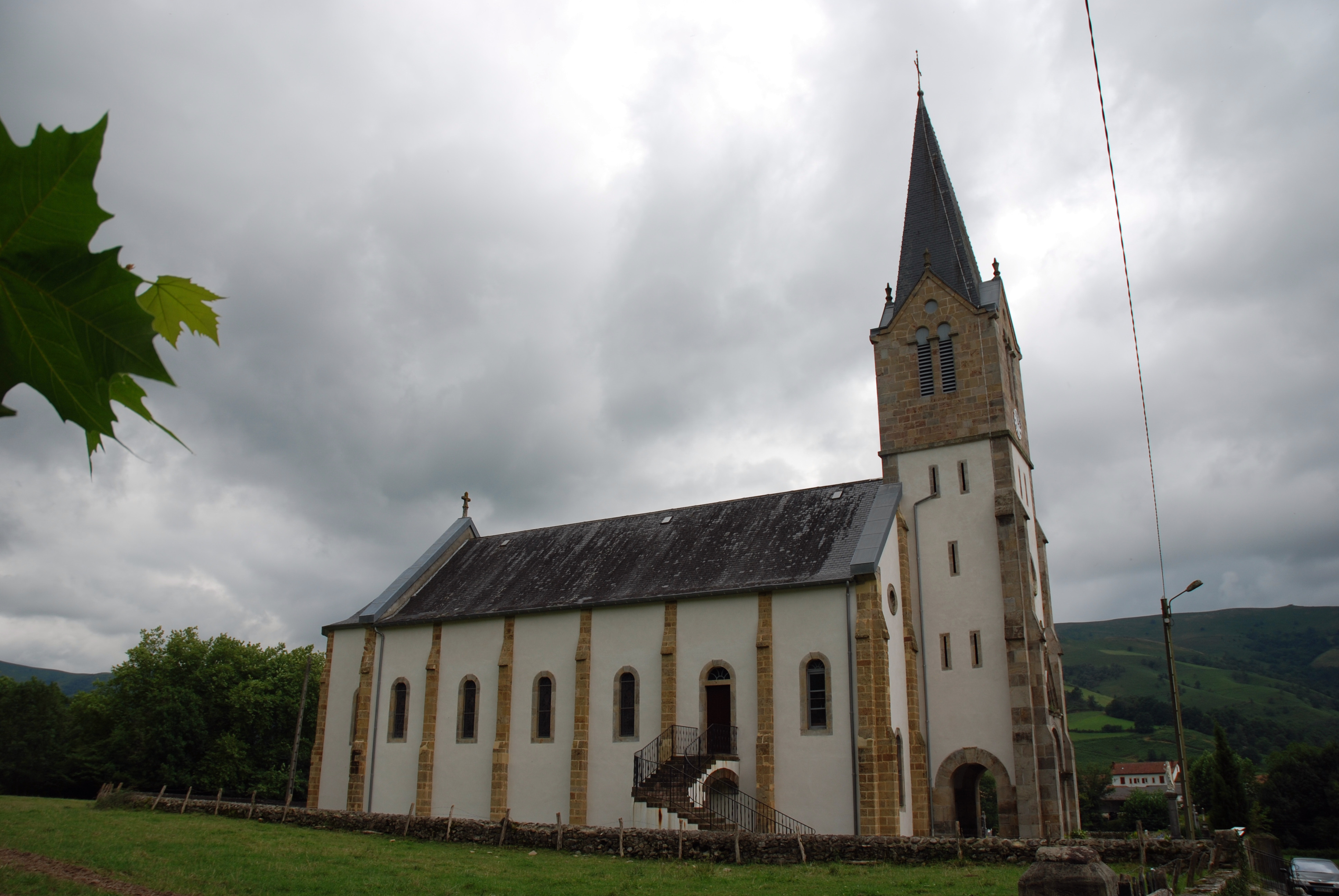 Lecumberry, l'église Saint-Martin